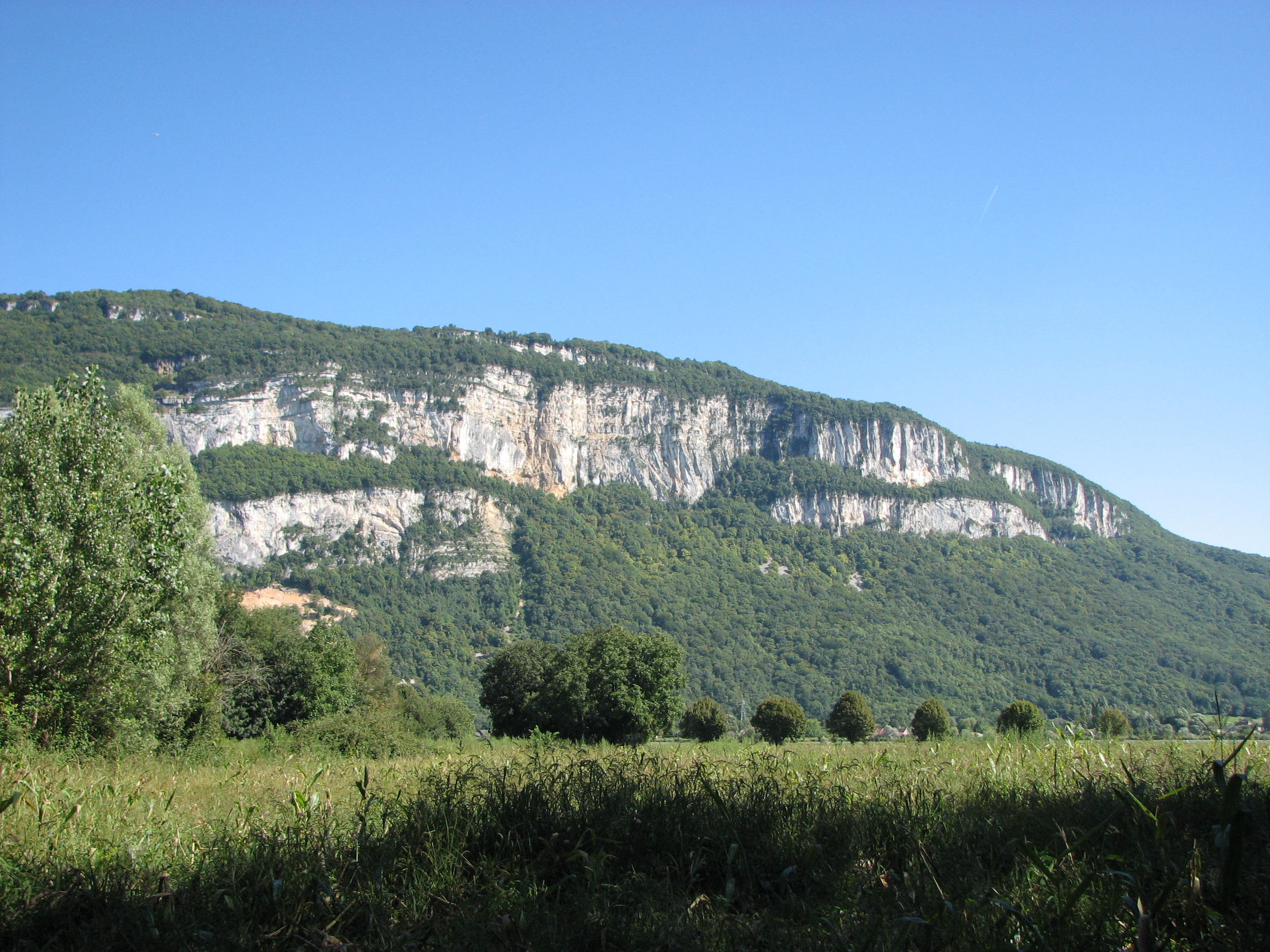 Le mont Tournier, vu de Murs-et-Gélignieux.